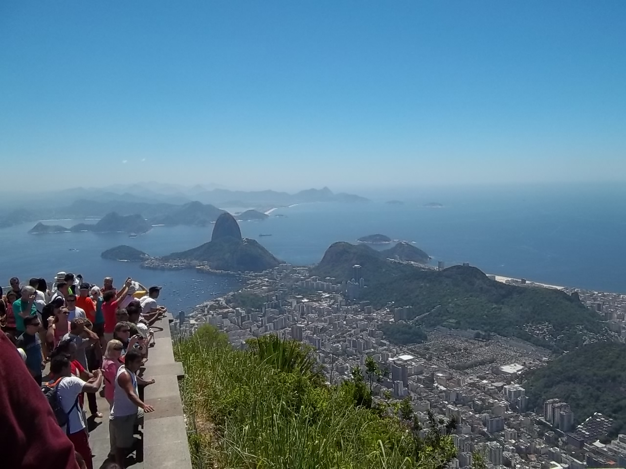 Diariamente miles de turistas visitan el Cristo Redentor y admiran la belleza del paisaje desde allí.